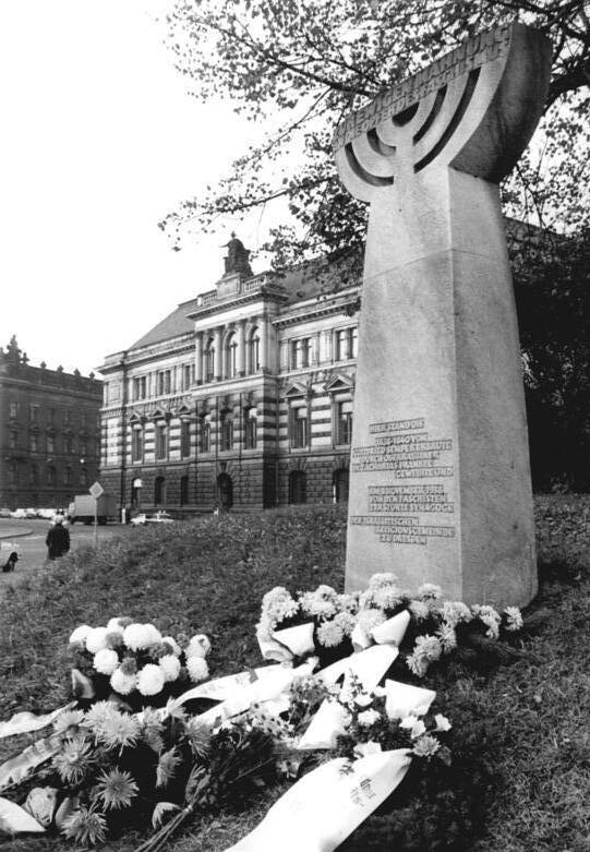 Dresden, Denkmal für die Opfer des Nationalsozialismus ADN-ZB Hiekel 9.11.1987-A-Dresden: Jahrestag der Progromnacht-Zum Gedenken an die sechs Millionen während der Nazibarbarei ermordeten Juden wurden an einer Stele Blumengebinde niedergelegt. An dieser Stelle hatte die von Gottfried Semper 1838–1840 erbaute Synagoge gestanden, die während der antisemitischen Progromnacht zerstört worden war.